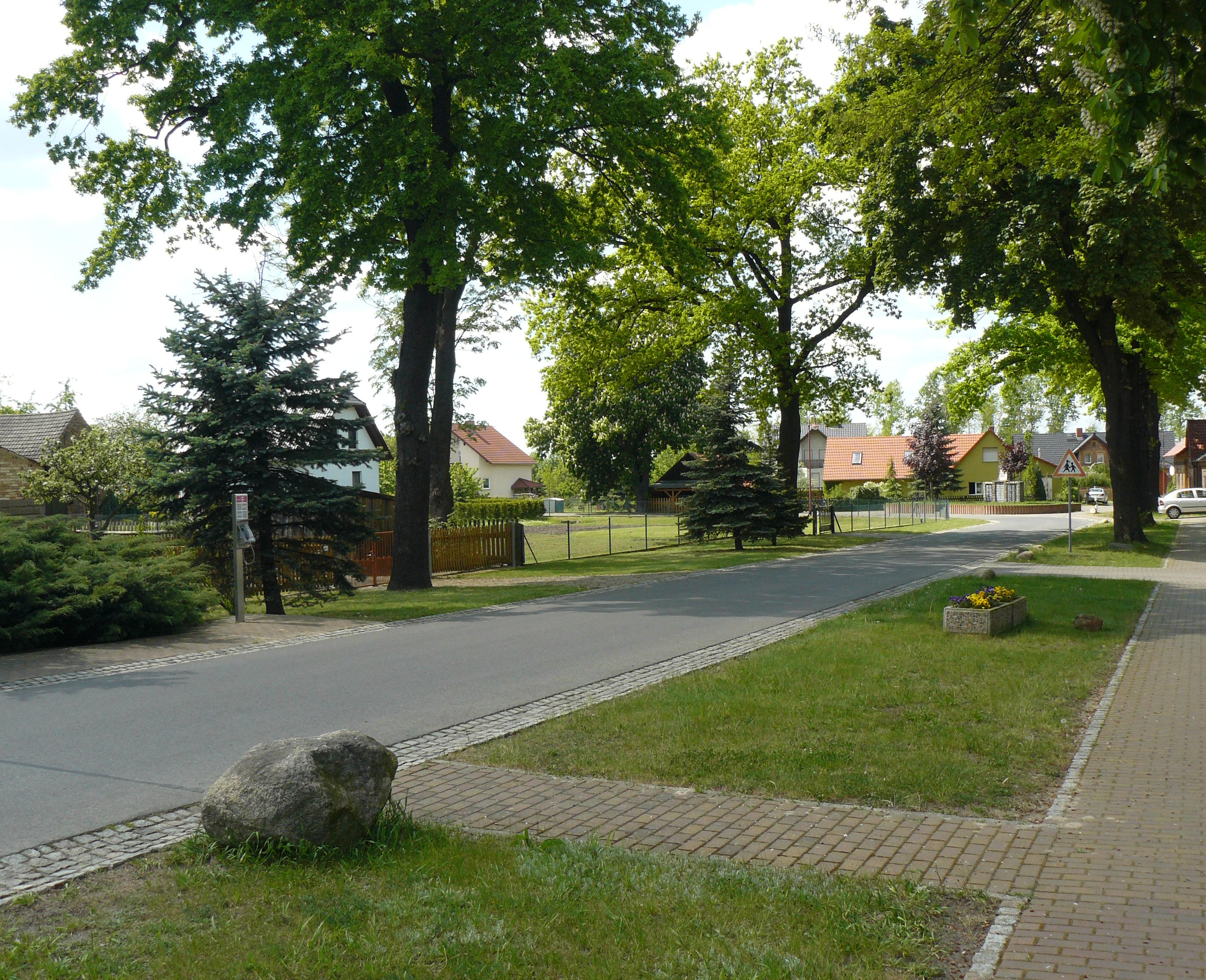 Mühlrose in Sachsen: Blick vom Gemeindeamt über blühende Landschaften. Map: 51° 30′ N, 14° 31′ E